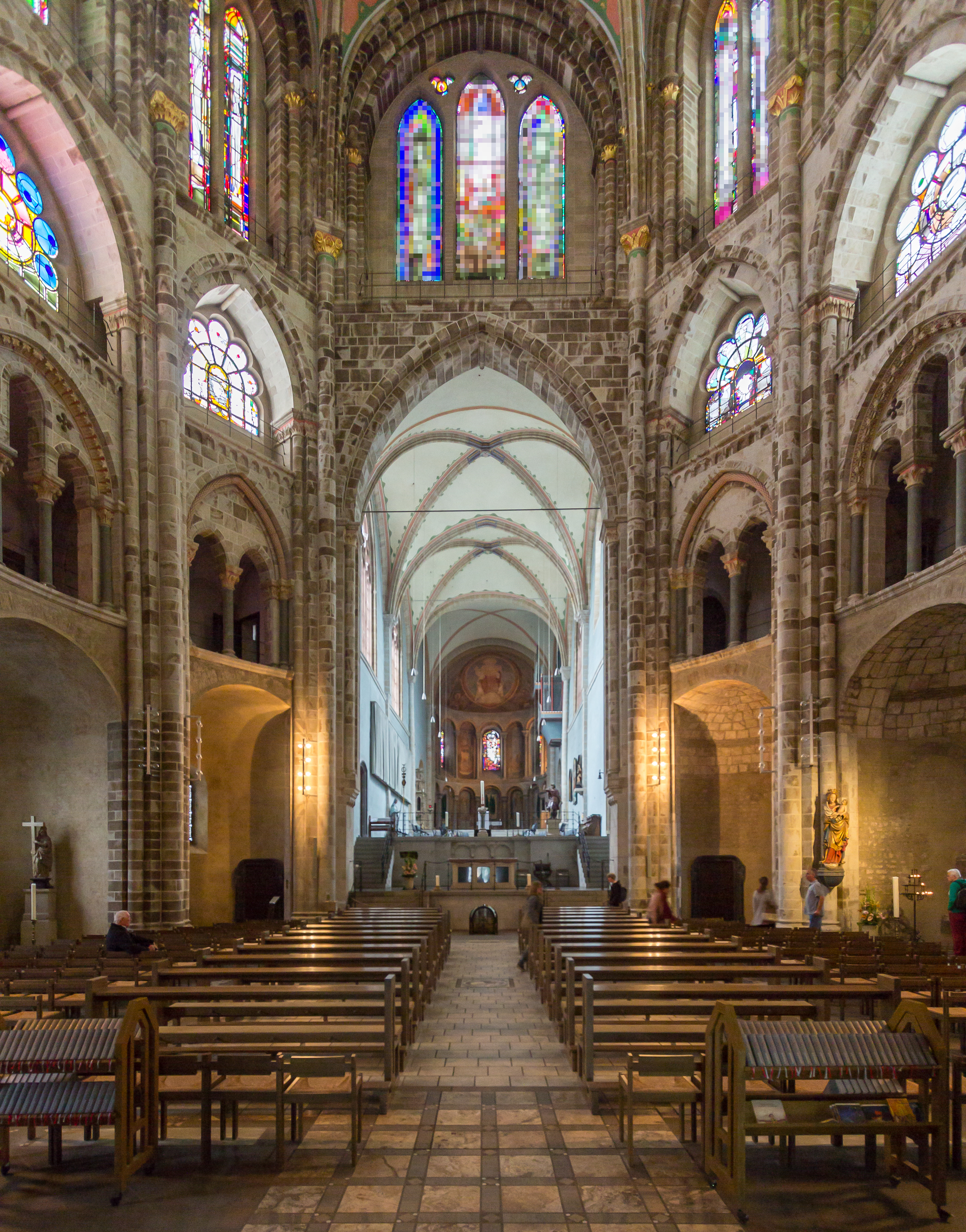 St. Gereon Köln - Kirchenschiff in Richung Chor This is a photograph of an architectural monument.